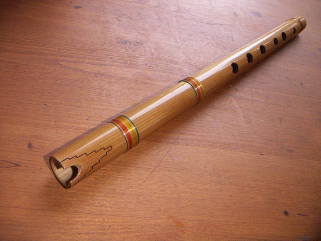 Quena, fabricada per Daniel d'Amico (Argentina)